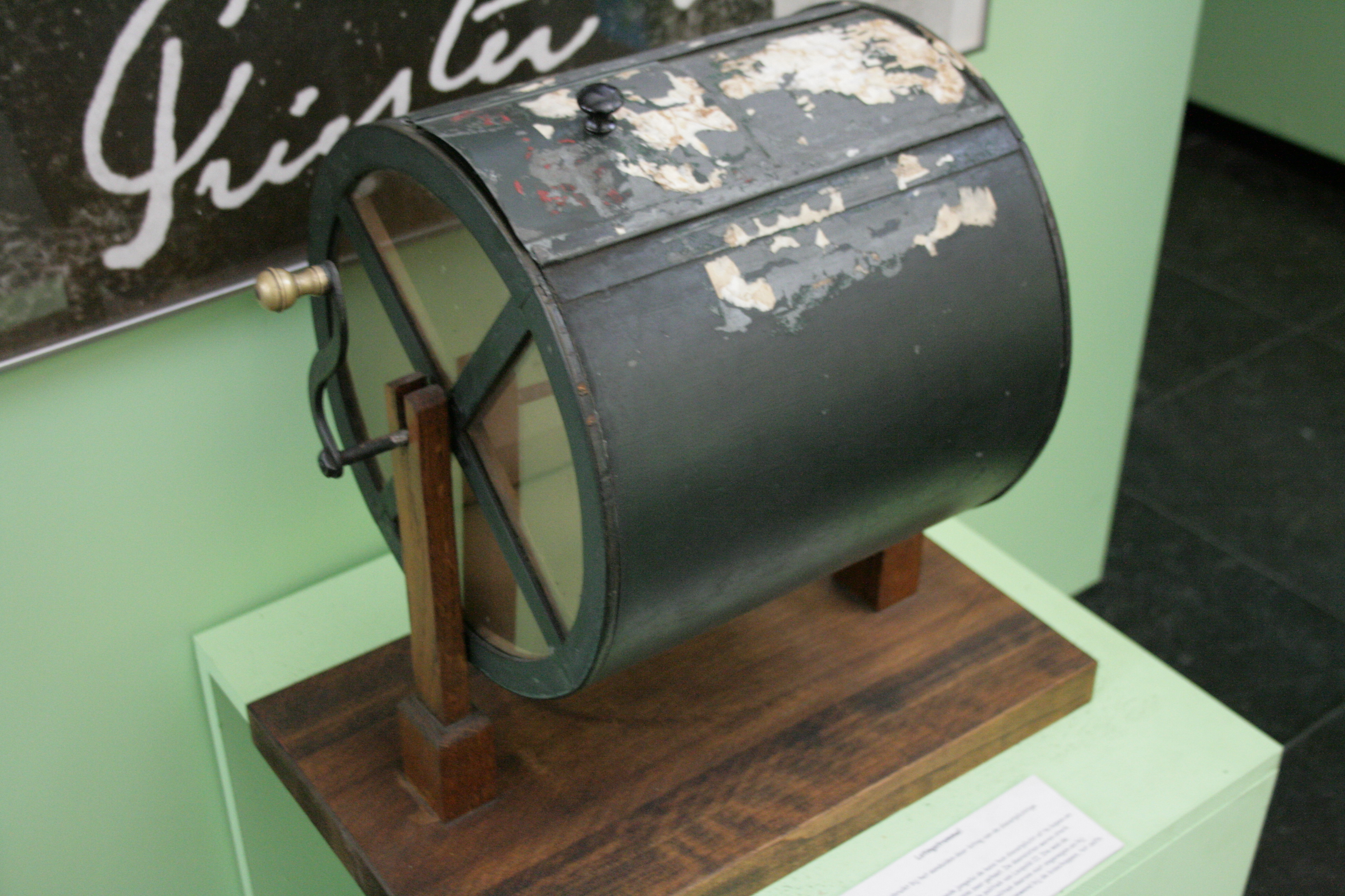 Tambour employé pour la désignation par tirage au sort des conscrits en Belgique jusqu'en 1909. Stedelijk Museum, Alost, Belgique